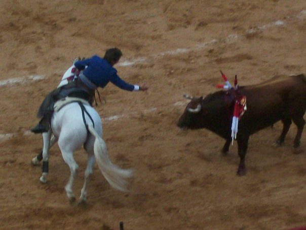 Fotografía del rejoneador español durante la fiesta del 22 de febrero en la Plaza de Toros México / Photograph of the Spanish rejoneador during the party on February 22 at the Plaza de Toros Mexico